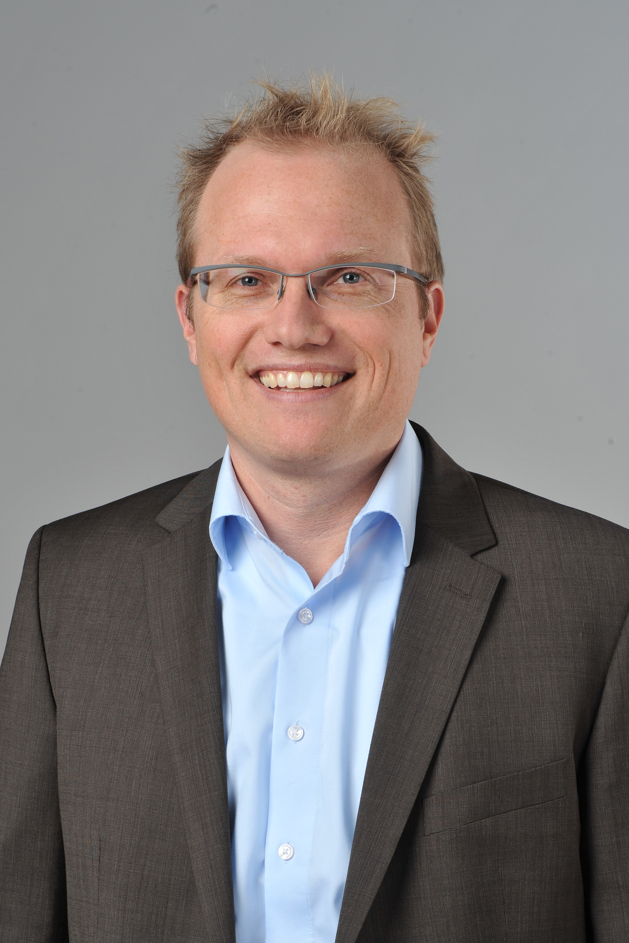 Landtagsprojekt Nordrhein-Westfalen 27. - 29. November 2013 Jochen Ott